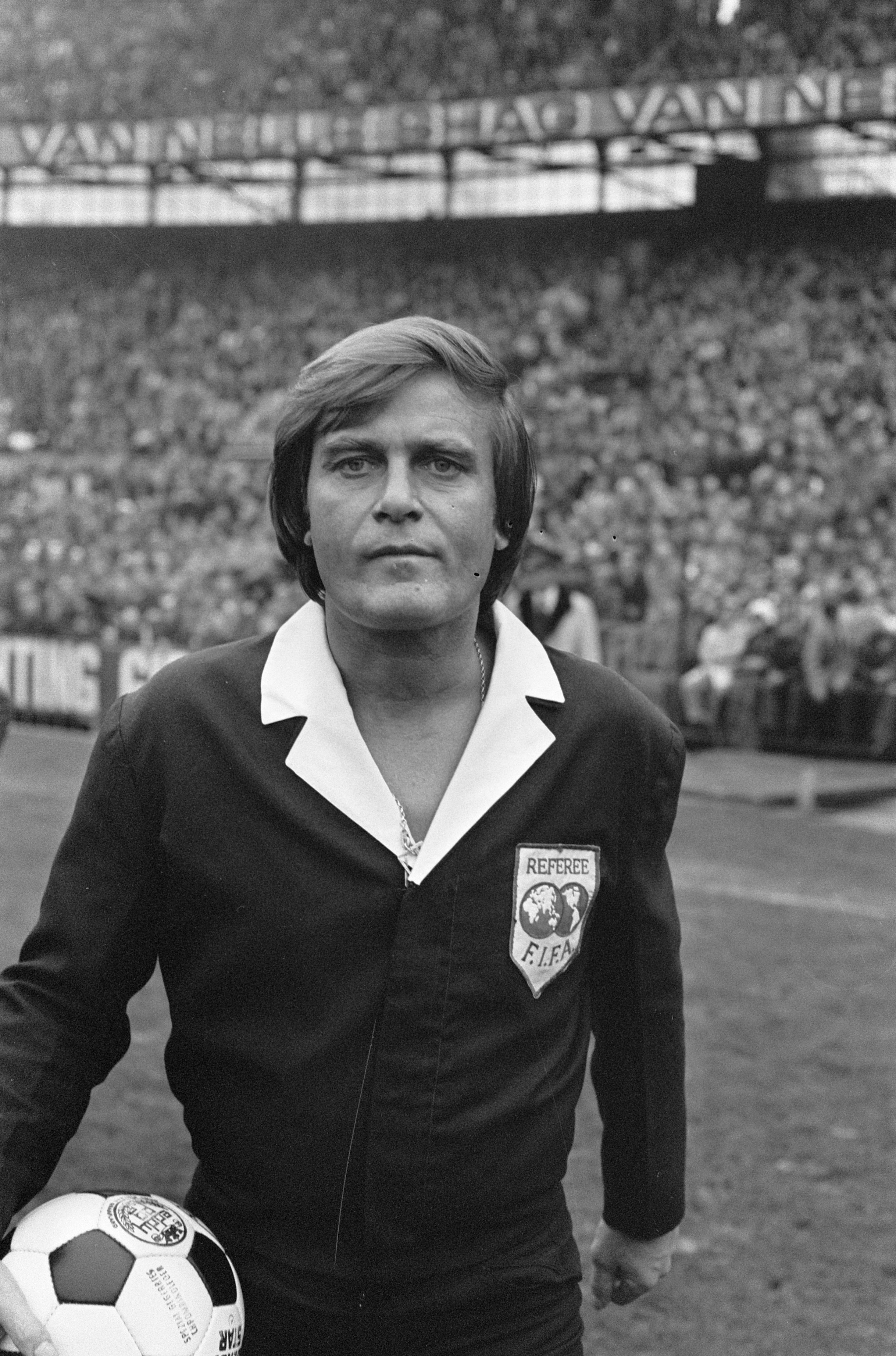 Collectie / Archief : Fotocollectie Anefo Reportage / Serie : [ onbekend ] Beschrijving : Feijenoord tegen Ajax 1-1; scheidsrechter Frans Derks , Datum : 14 november 1976 Trefwoorden : scheidsrechters Persoonsnaam : Frans Derks Instellingsnaam : Feyenoord Fotograaf : Peters, Hans / Anefo Auteursrechthebbende : Nationaal Archief Materiaalsoort : Negatief (zwart/wit) Nummer archiefinventaris : bekijk toegang 2.24.01.05 Bestanddeelnummer : 928-8866